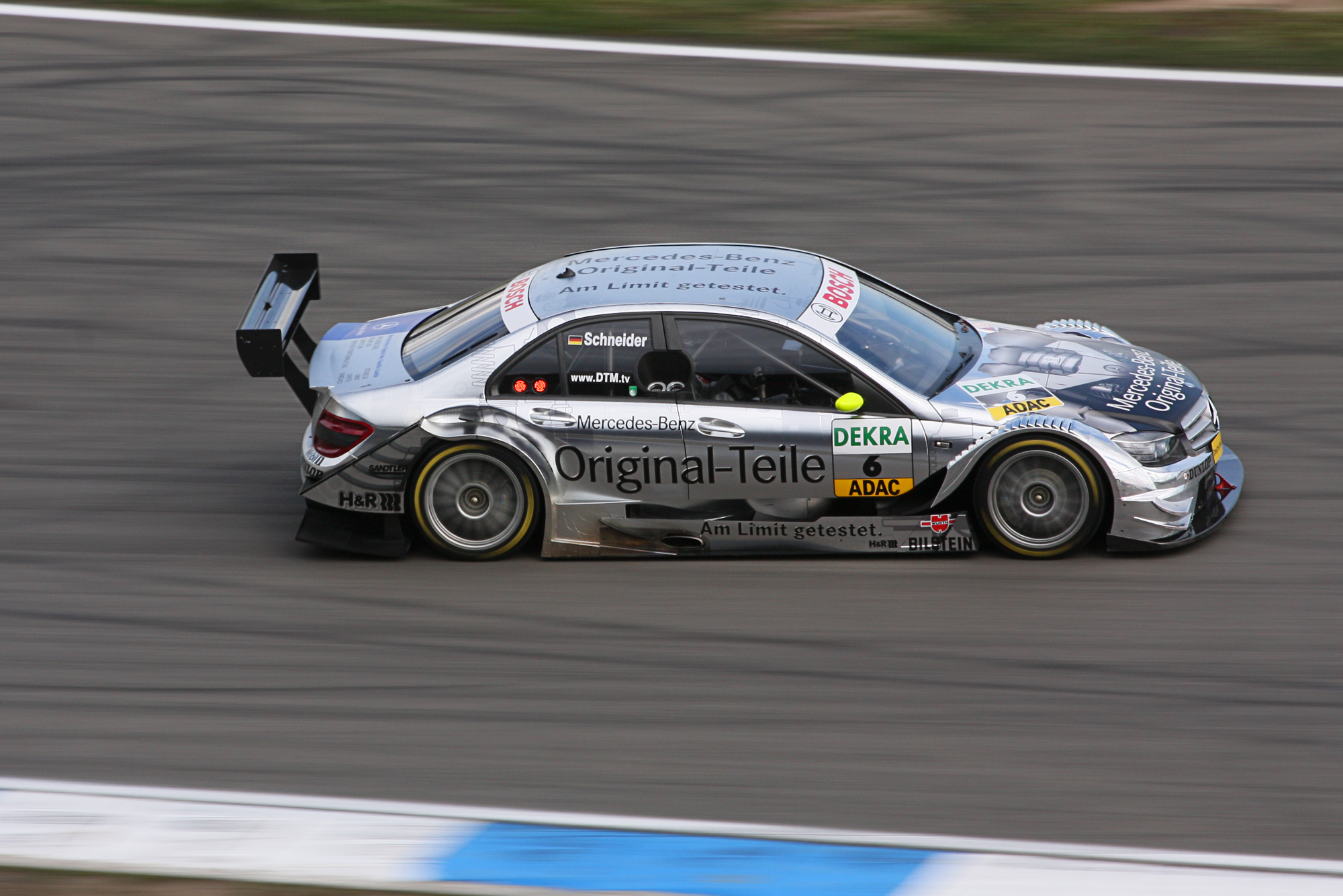 DTM car Mercedes-Benz Season 2008 (C-Class, W204), Bernd Schneider (driver)